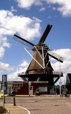 Moinho de Arapoti.